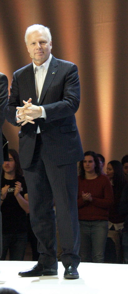 Marta Rovira, Jean_François Lisée i Peter Jambrek a l'Acte d'ERC pro-referèndum. Barcelona 4-3-2017